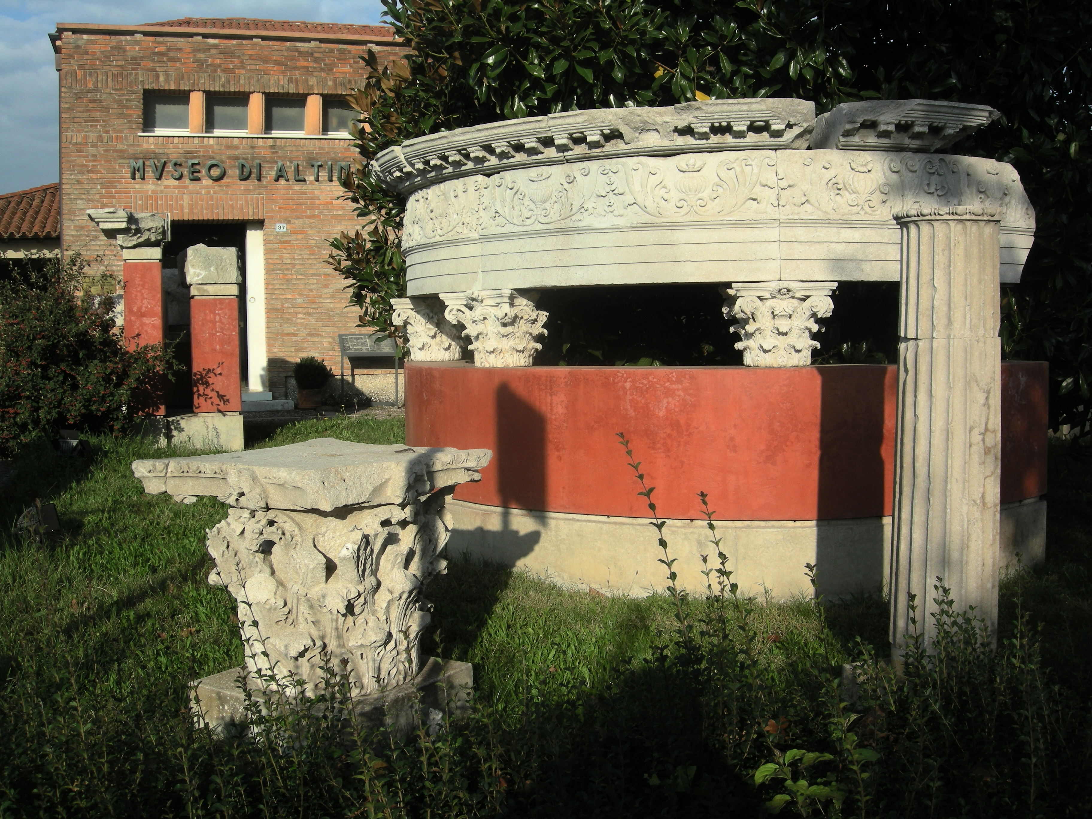 Cervellin, opera propria, museo di Altino (VE) italy, lic. GFDL, data 27.10.2009